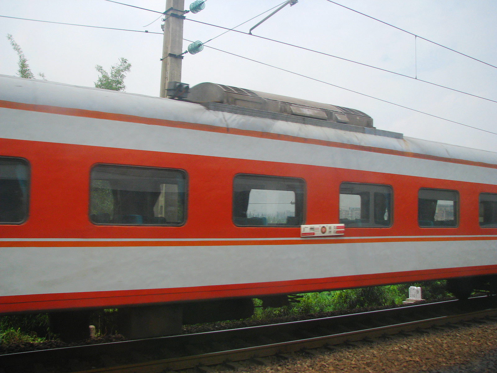 中国铁路RZ25型软座车，原为广九直通车车体